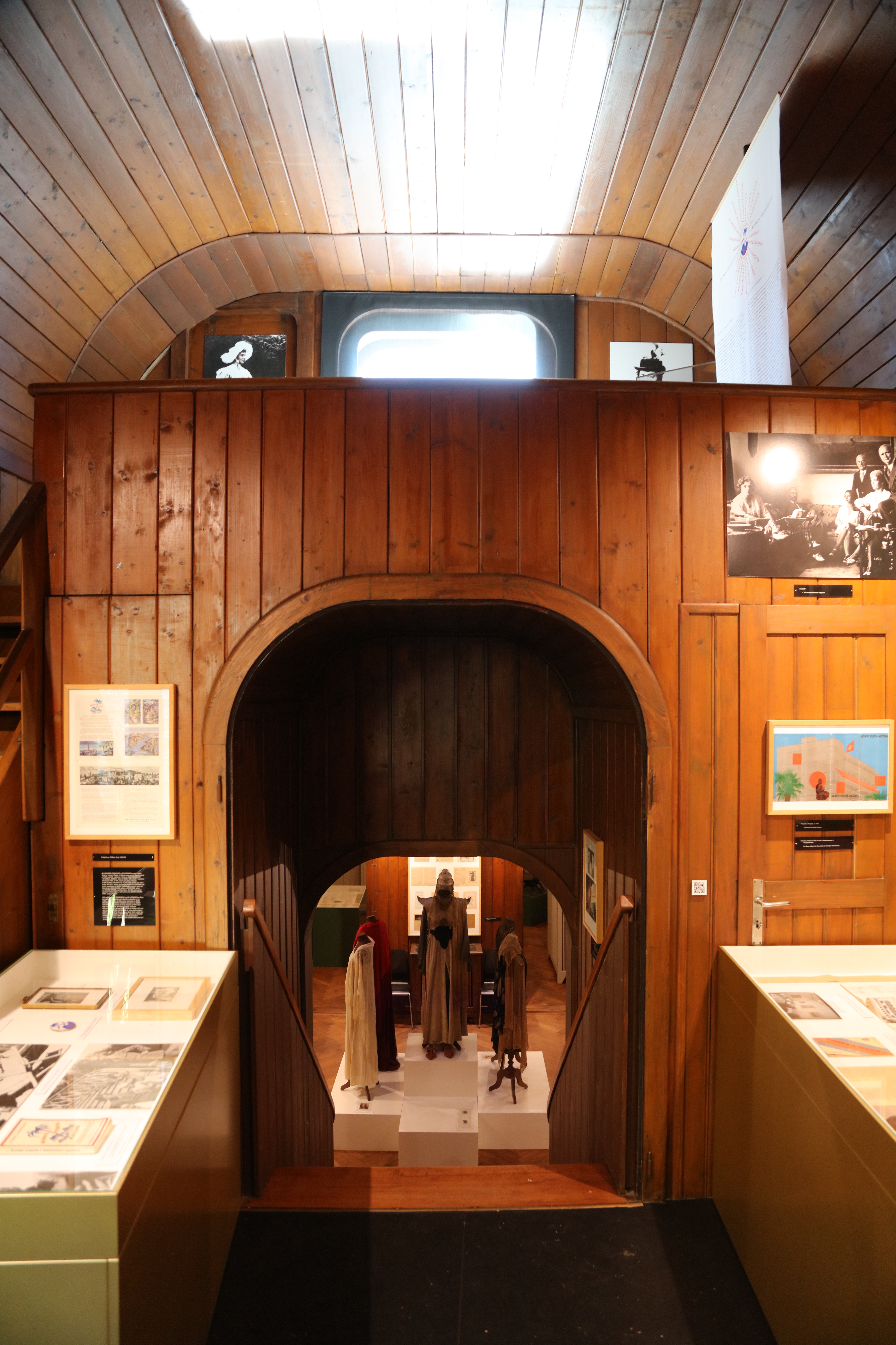 Innenaufnahmen aus der Casa Anatta.